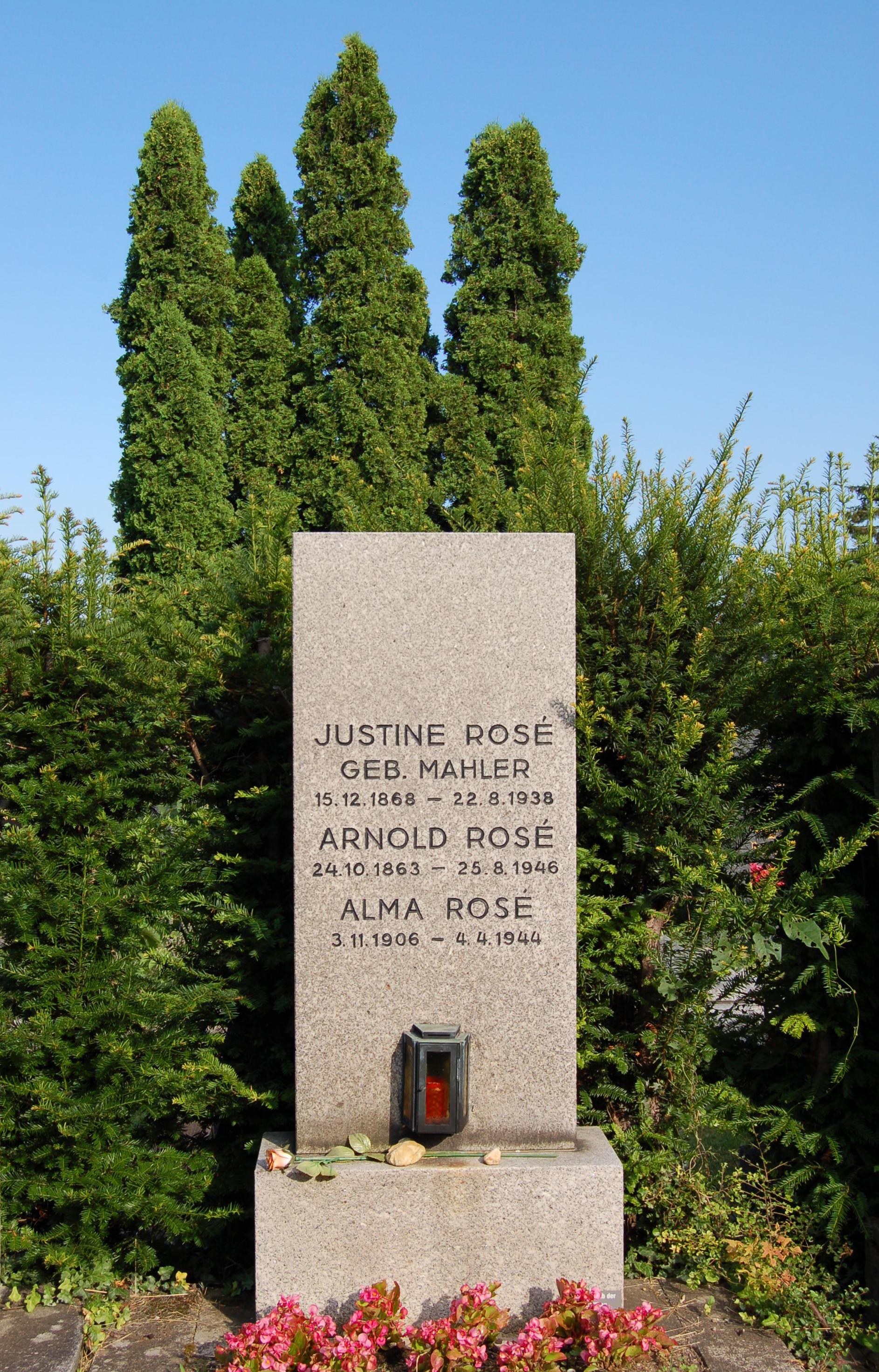 Grinzinger Friedhof, Grabmal von Arnold Rose